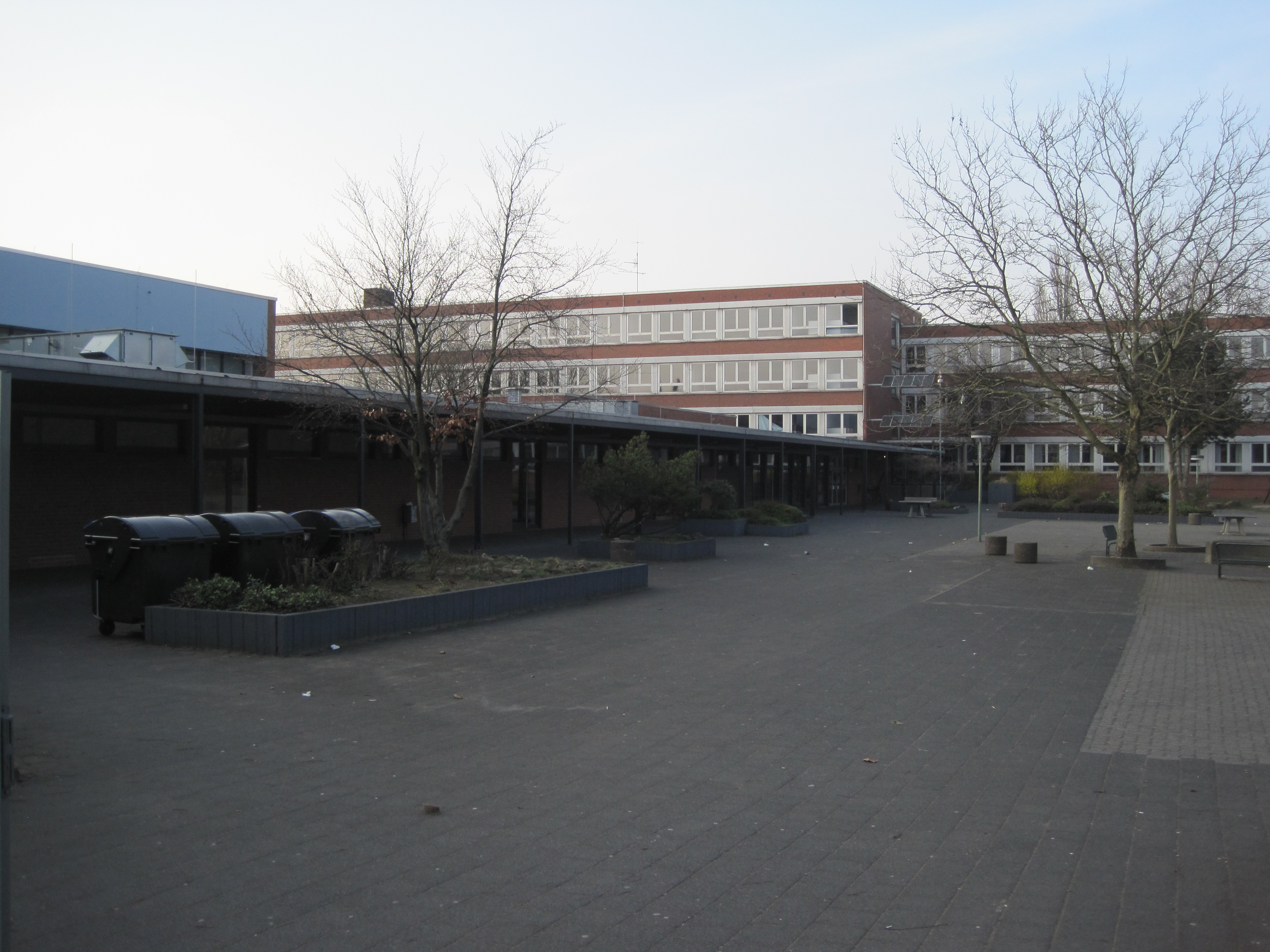 Das Foto zeigt das Galilei-Gymnasium Hamm mit Blick vom Schulhof.